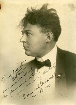 Emanuel Ondříček (1880 - 1958), Český houslista.